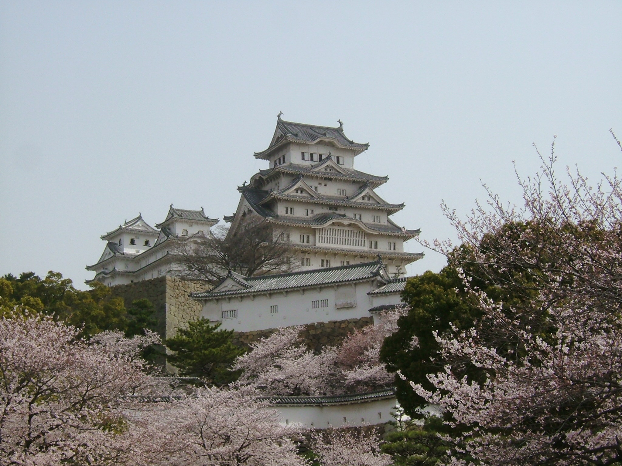 桜の季節の姫路城を三の丸より望む Himeji castle's sakura in full bloom, April 2006